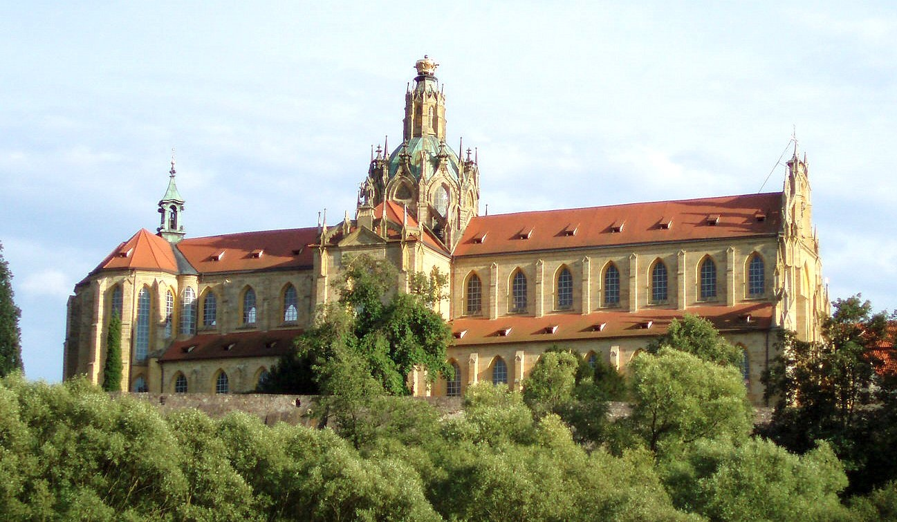 Klášter Kladruby